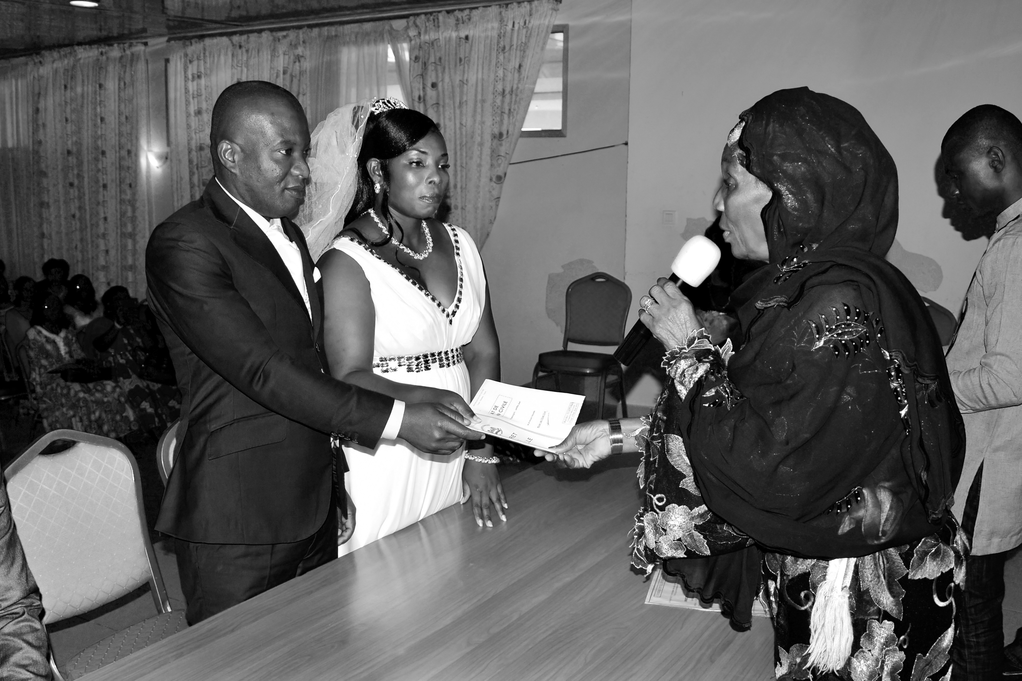 Femme maire remettant le livret de mariage à des mariés dans une mairie de la ville d'Abidjan. This is an image of "African people at work" from Ivory Coast